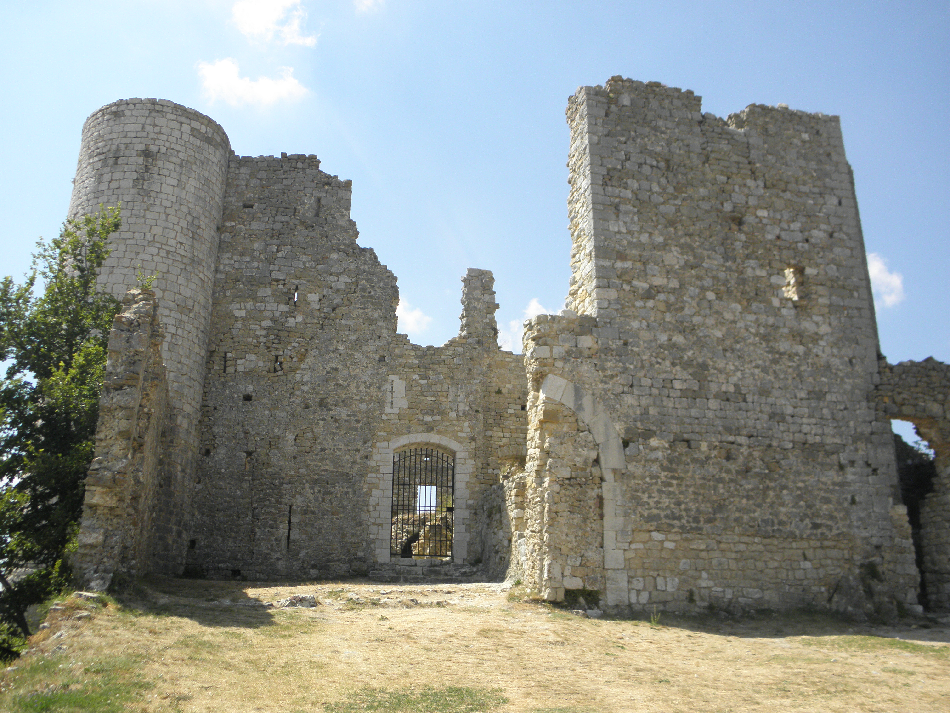 Remparts de Bargèmeenceinte, porte